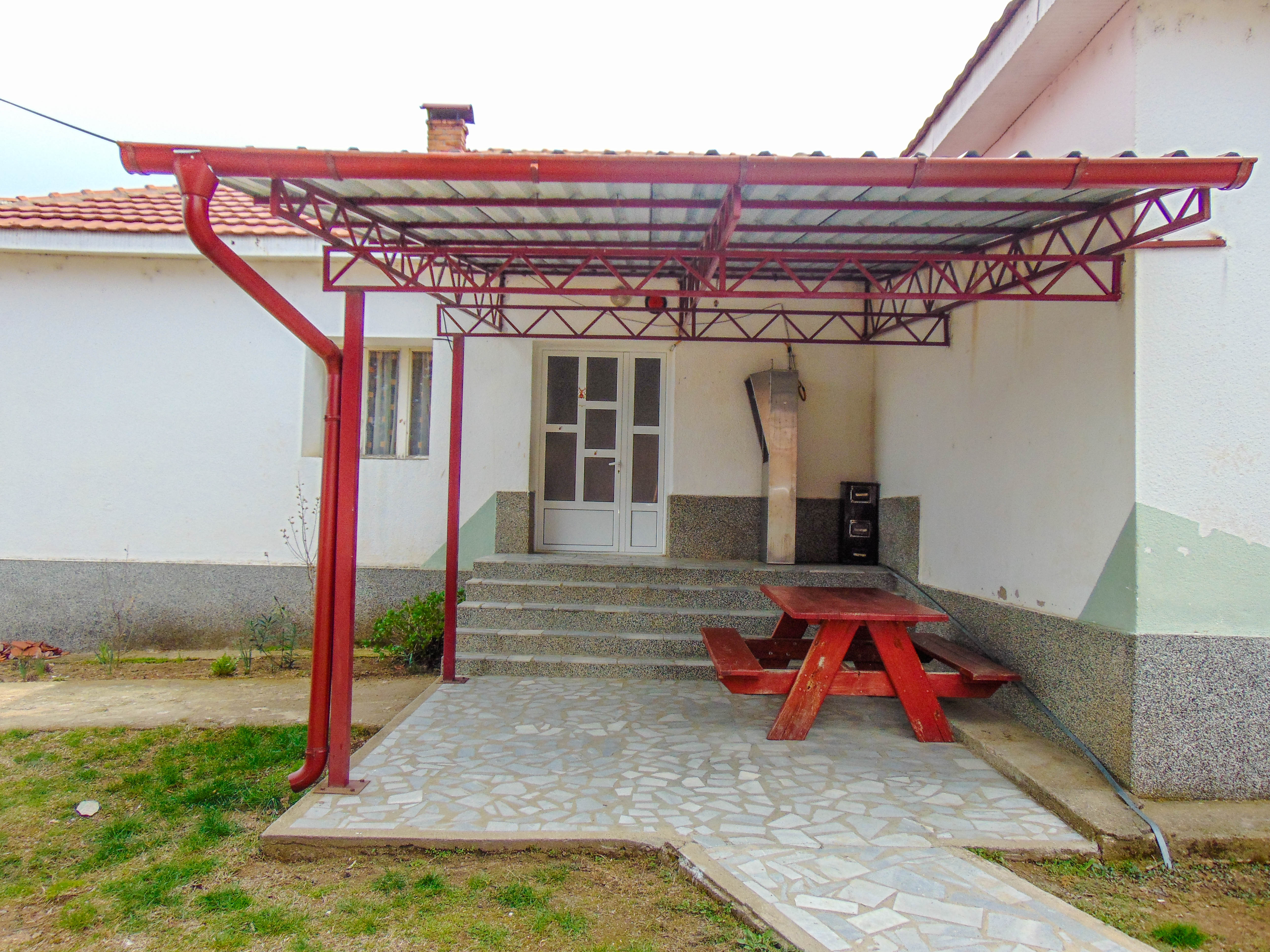 ОУ „Мануш Турновски“ - Старо Коњарево